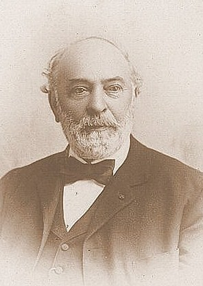 Louis Cailletet en 1909 à l'age de 77 ans